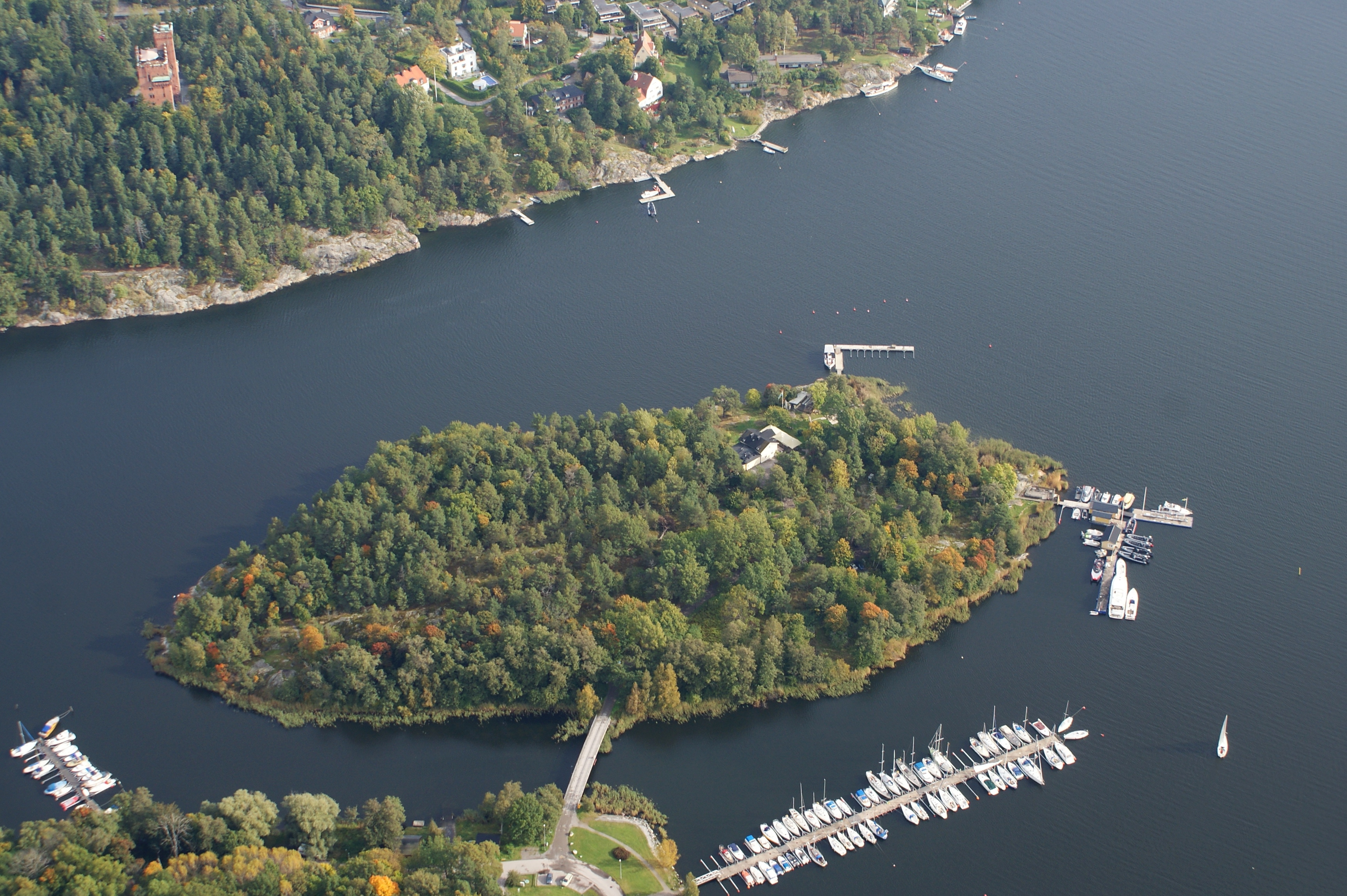 Bockholmen, Solna kommun, sedd från helikopter. Till vänster på Stocksundssidan (Danderyds kommun) Cedergrenska tornet.